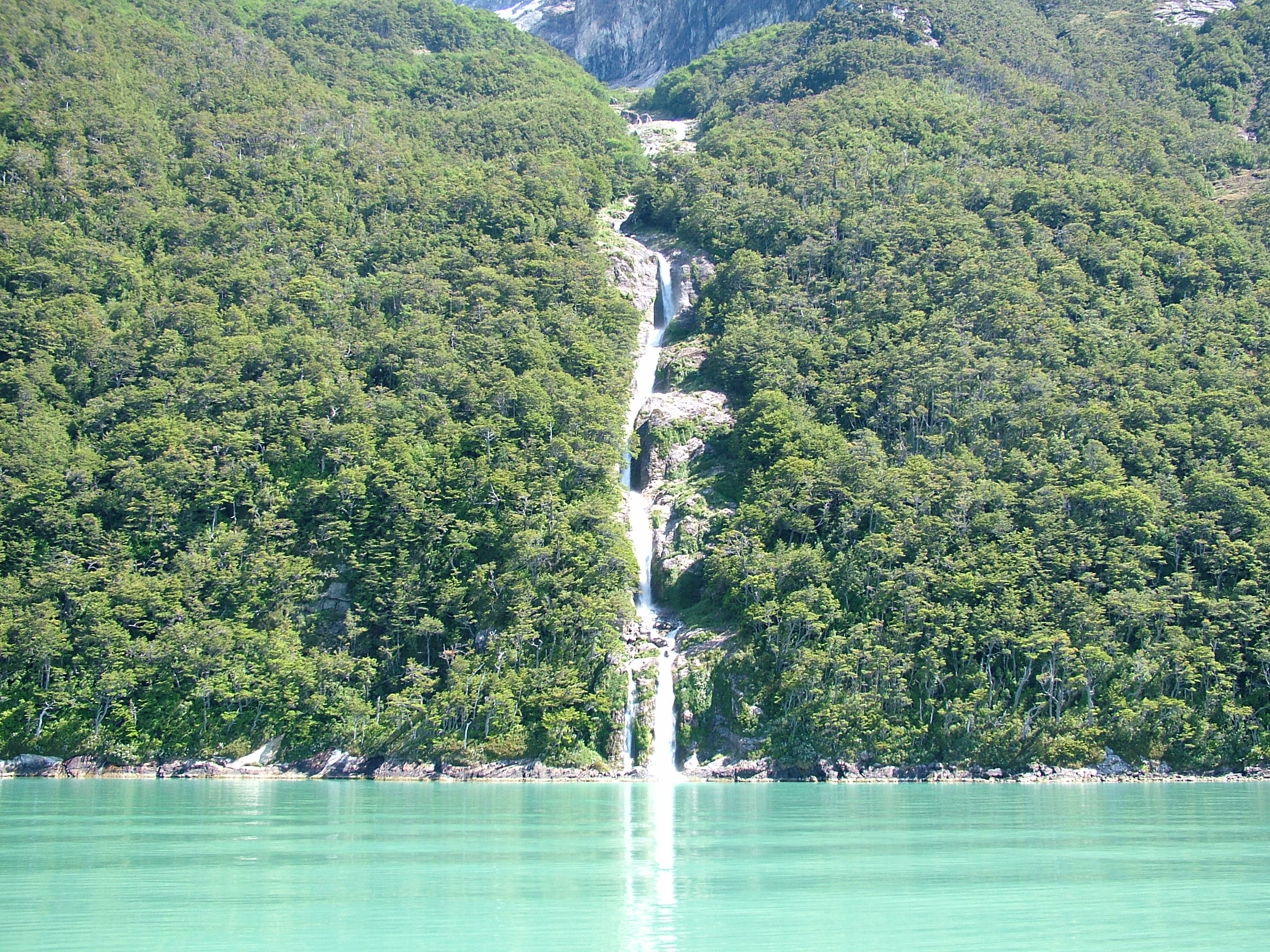 Seno Última Esperanza, Chile.